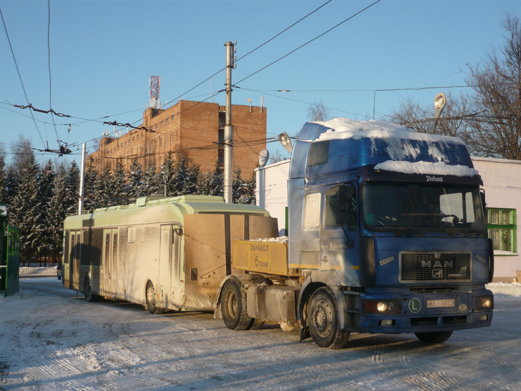 Троллейбус АКСМ-321 приходит в Курск